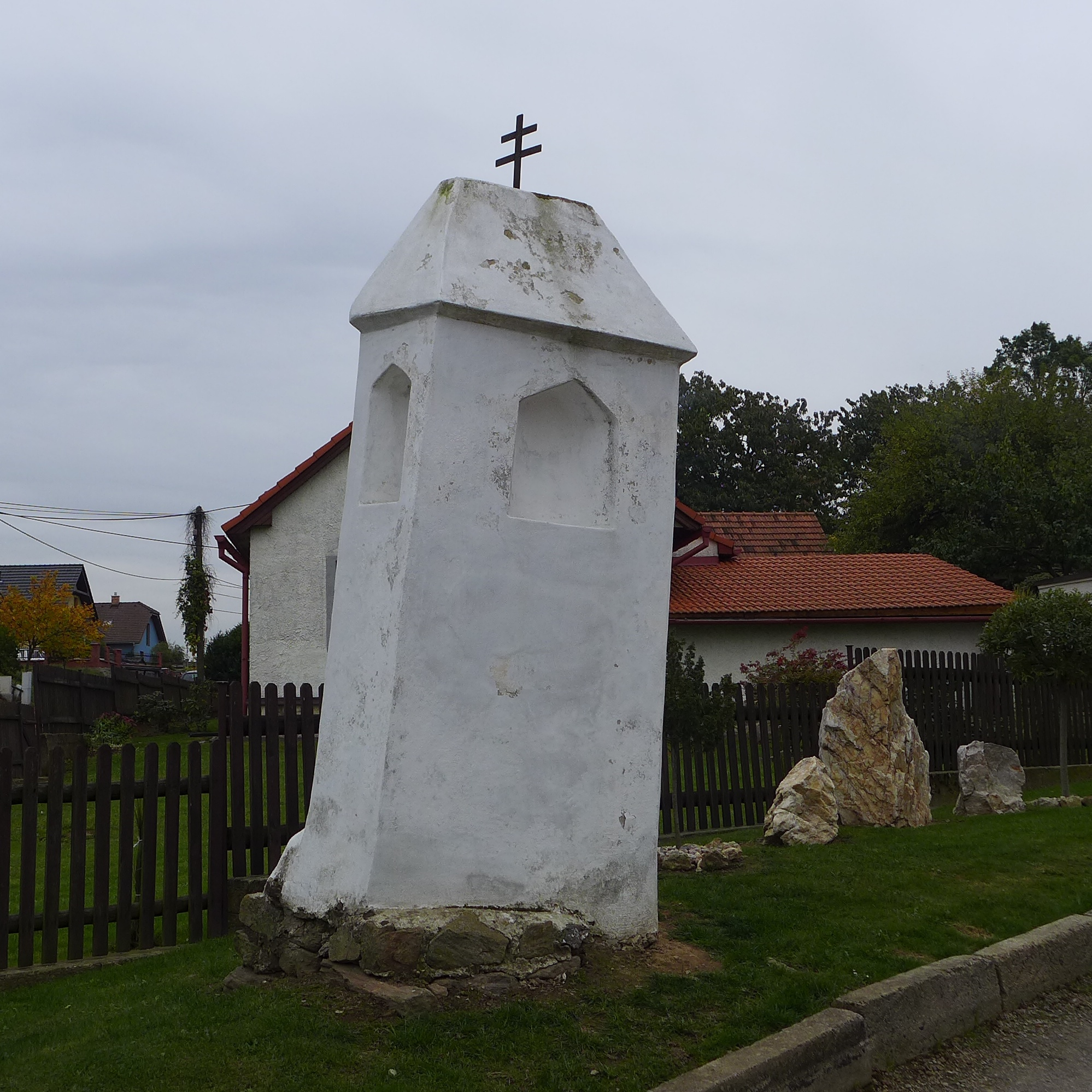 Boží muka, u vsi, Řehořov.